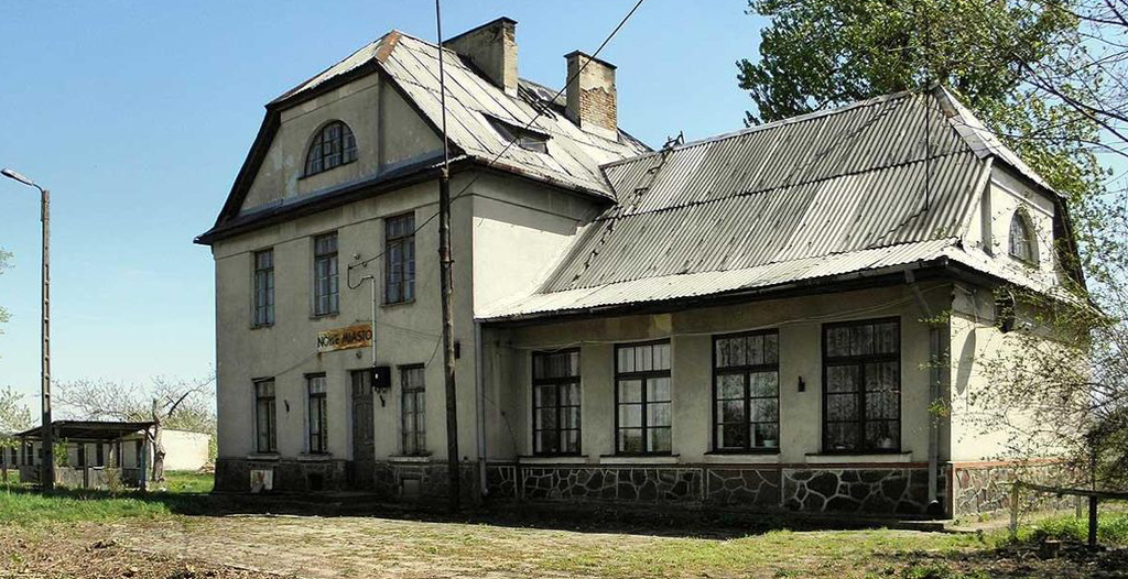 Nowe Miasto nad Pilicą (województwo mazowieckie), Dworzec kolejki wąskotorowej już nieczynnej